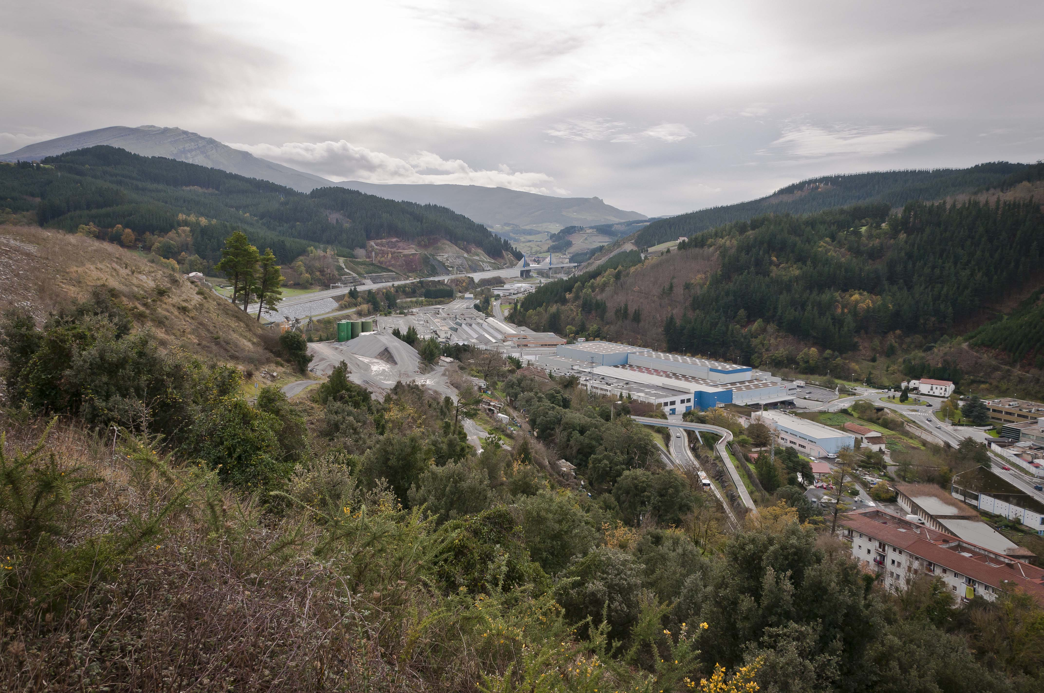 Planta de Fagor en Arrasate-Mondragón